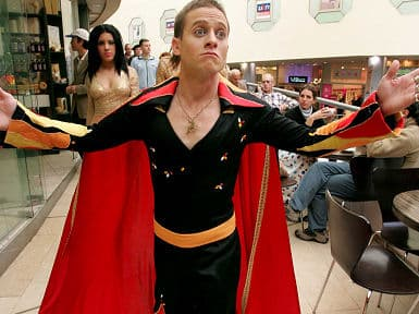 אורן ג'ורנו